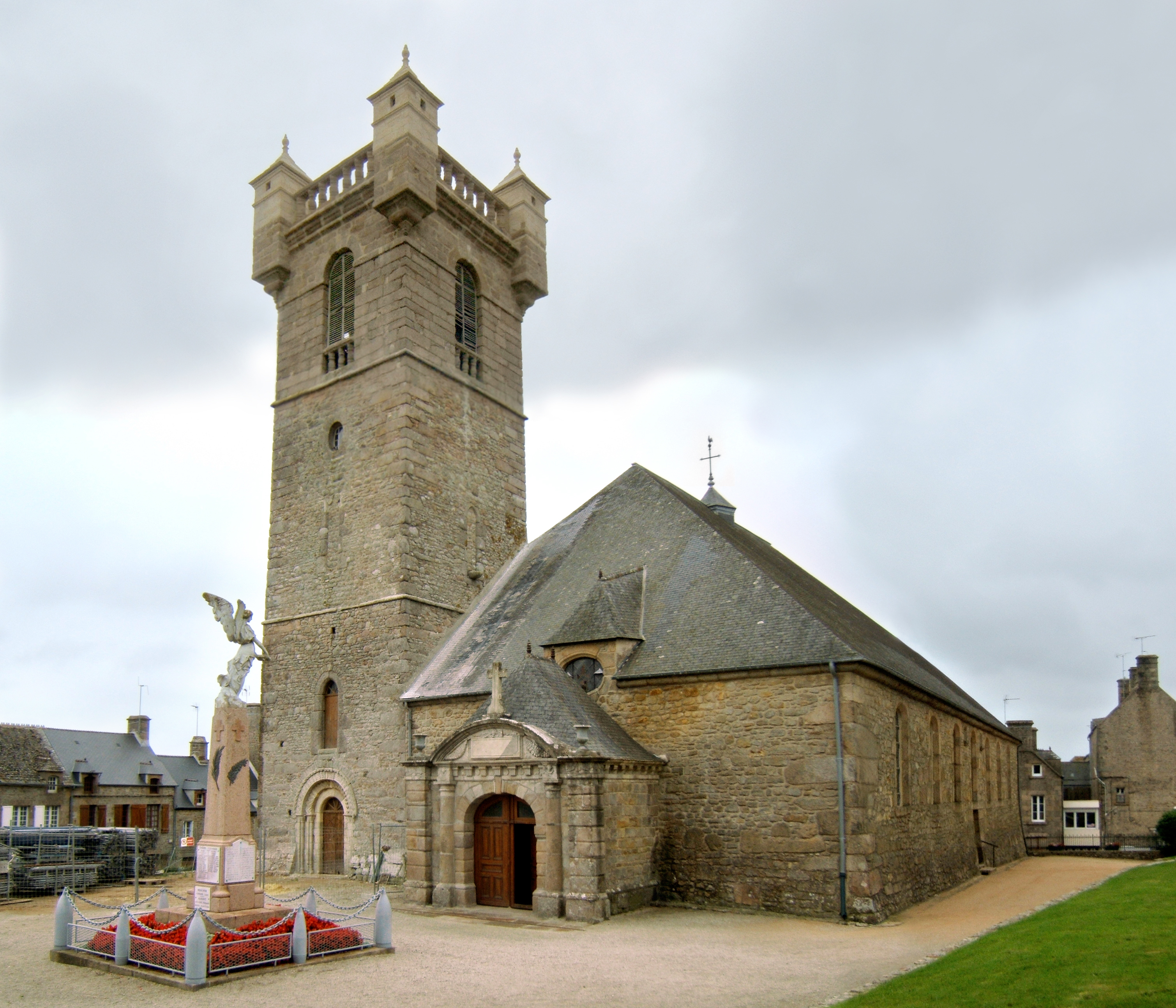 L'église Saint-Pierre de Saint-Pierre-Église dans le département de la Manche.